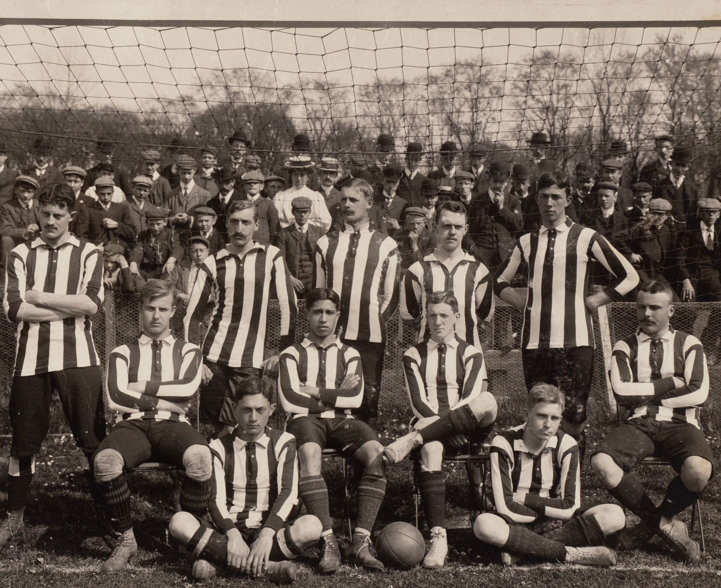 Nederlands elftal voor de interland tegen België. Staand van links naar rechts: Toine van Renterghem, Willem Janssen, Pieter Boelmans ter Spill, Constant Feith en Guus Lutjens. Zittend middelste rij: Iman Dozy, Karel Heijting, John Heijning en Reinier Beeuwkes (DFC). Zittend voorste rij: Ben Stom en Louis van Gogh. Nederland - België (1-2), gespeeld op 9 mei 1907 te Haarlem. Opstelling: Reinier Beeuwkes (DFC), Ben Stom (Velocitas Breda), John Heijning (HVV, aanvoerder), Karel Heijting (HVV), Willem Janssen (PW), Iman Dozy (Ajax Leiden), Toine van Renterghem (HBS), Louis van Gogh (HFC), Pieter Boelmans ter Spill (HFC), Constant Feith (HVV) en Guus Lutjens (HVV).